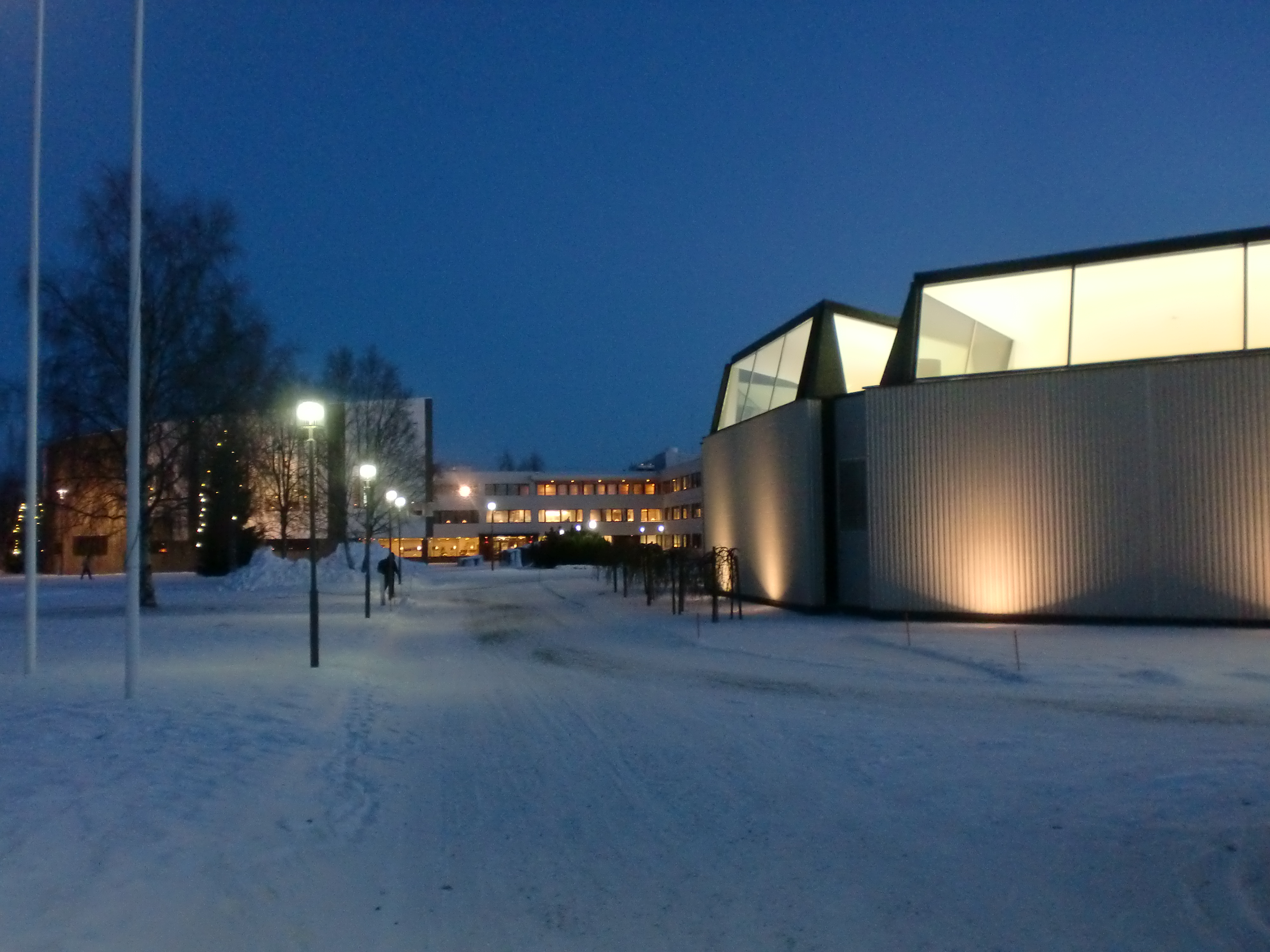 Rovaniemen hallinto- ja kulttuurikeskus; rakennettu kulttuuriympäristö Rovaniemellä